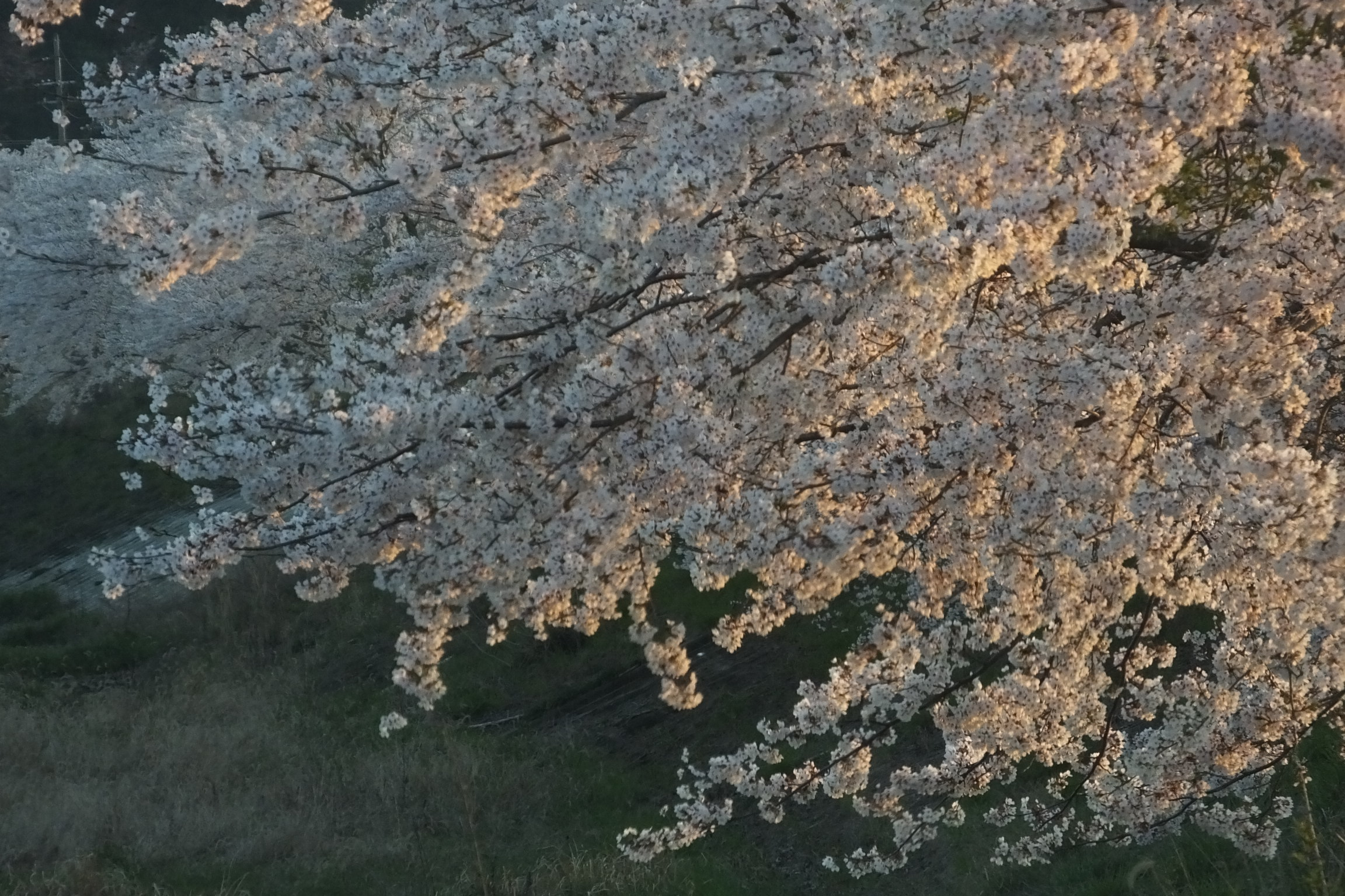 2020-04-07 Prunus × yedoensis Tambasasayama,Hyogo(丹波篠山市篠山川のソメイヨシノ)